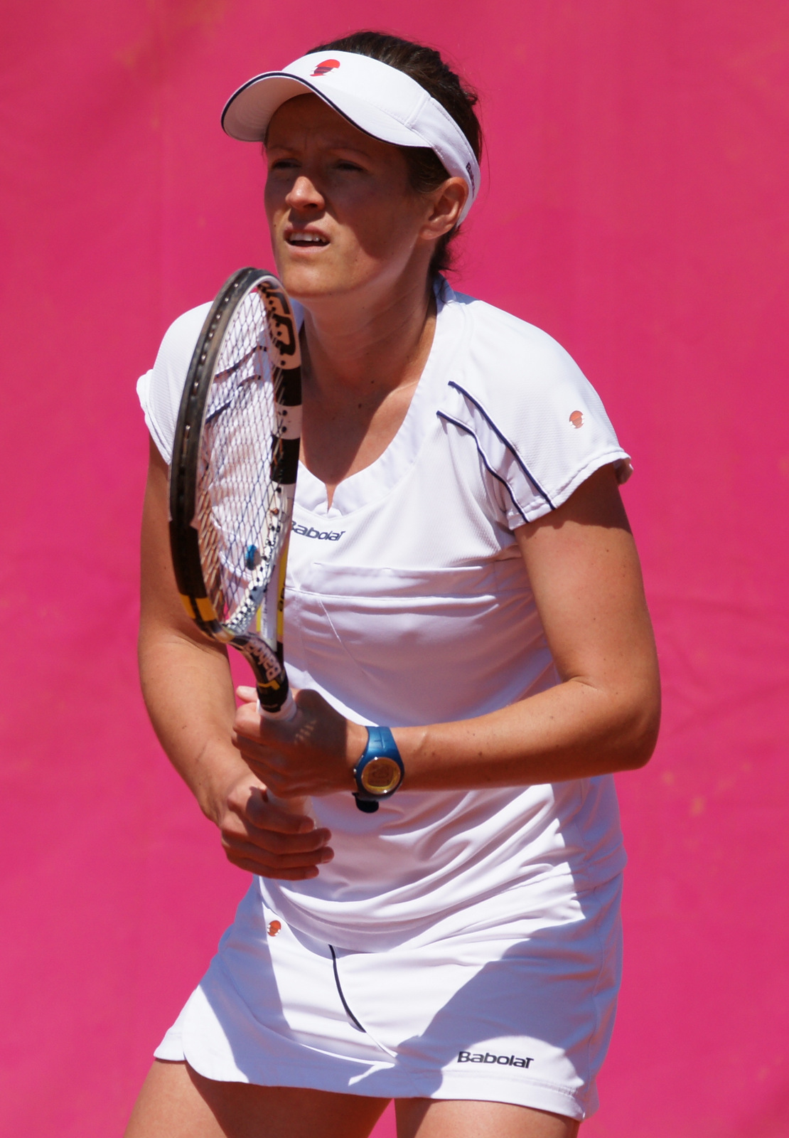 Sandra Martinović Open ITF Cagnes-sur-Mer 2011